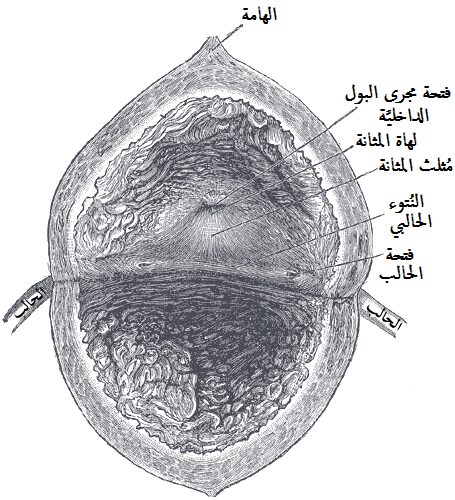 رسمٌ يُبيِّنُ داخل المثانة البشريَّة.